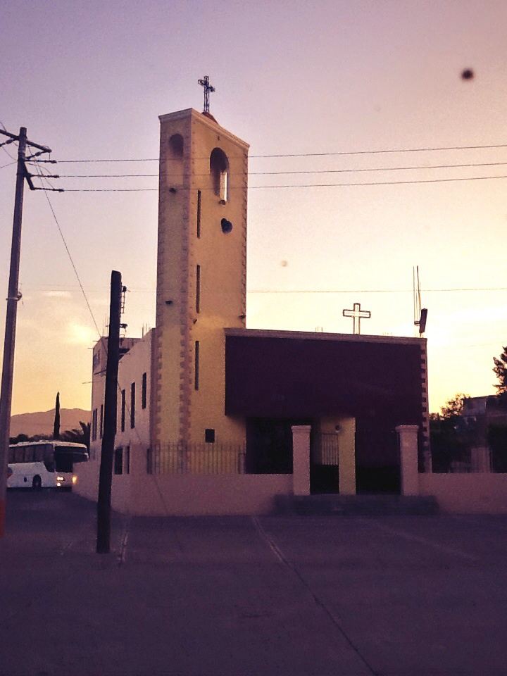 Capilla De Cristo Rey, La Barranca, Ecuandureo, Michoacan